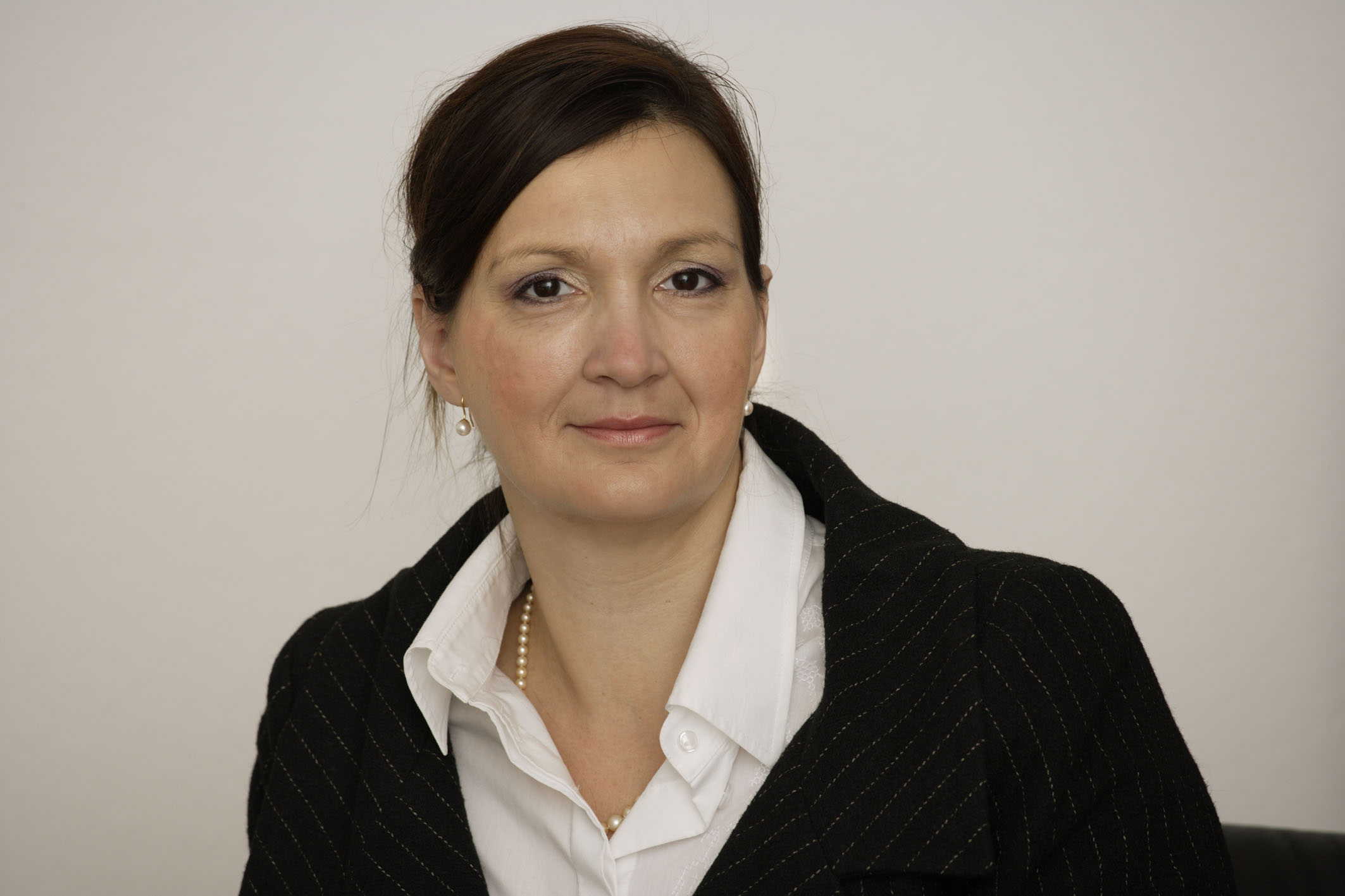 Angela Kolb